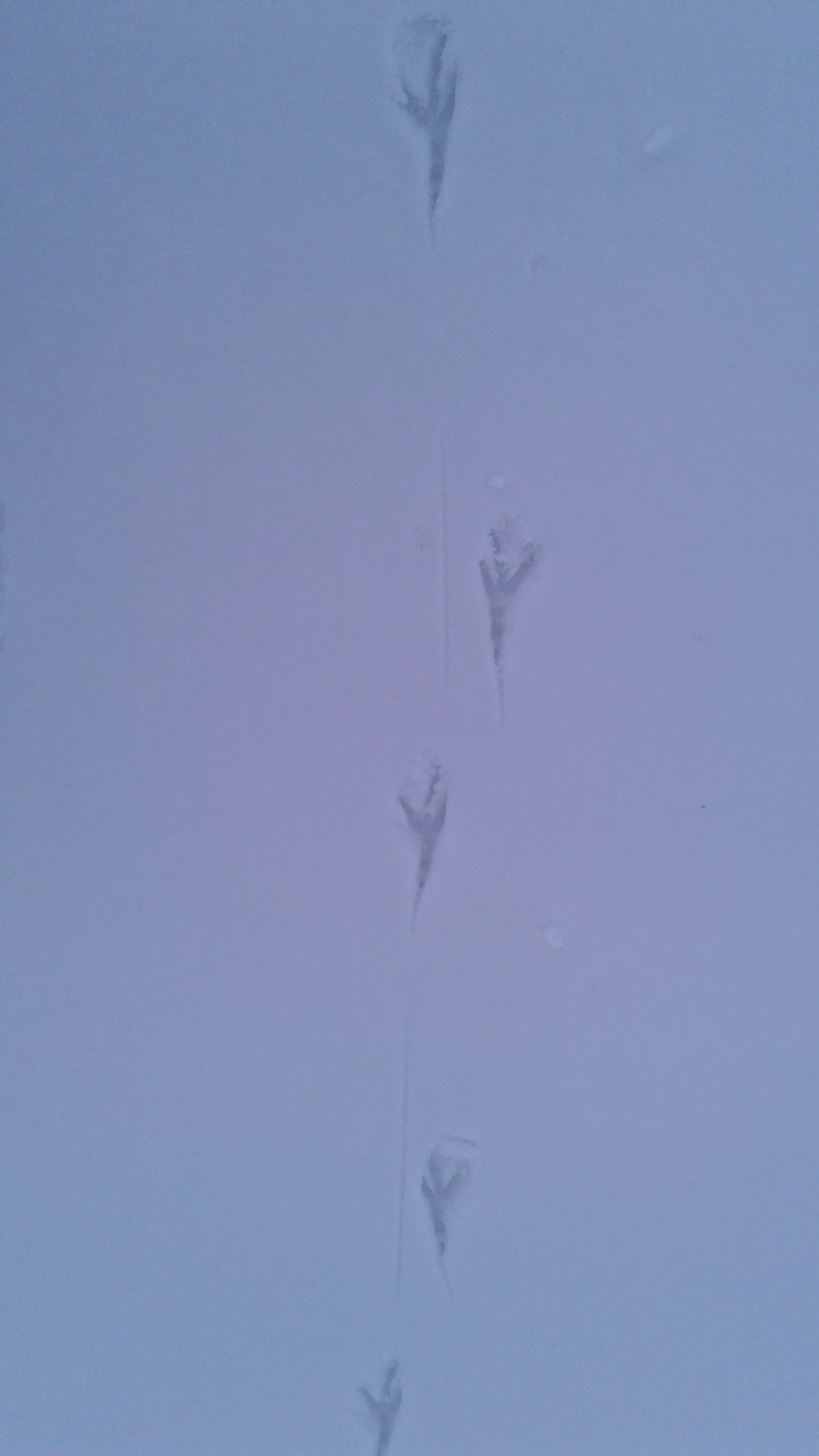 Знято мобілкою у лісі